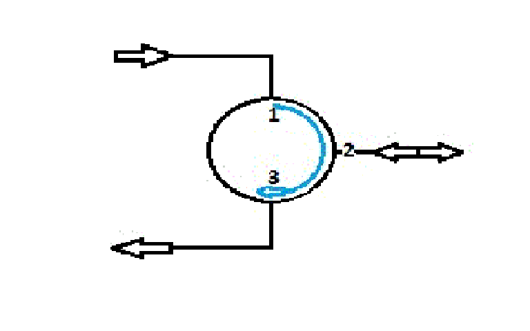 Zasada działania